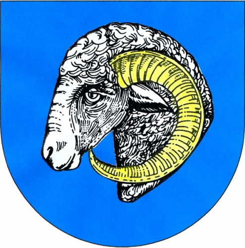 znak, Študlov, okres Svitavy